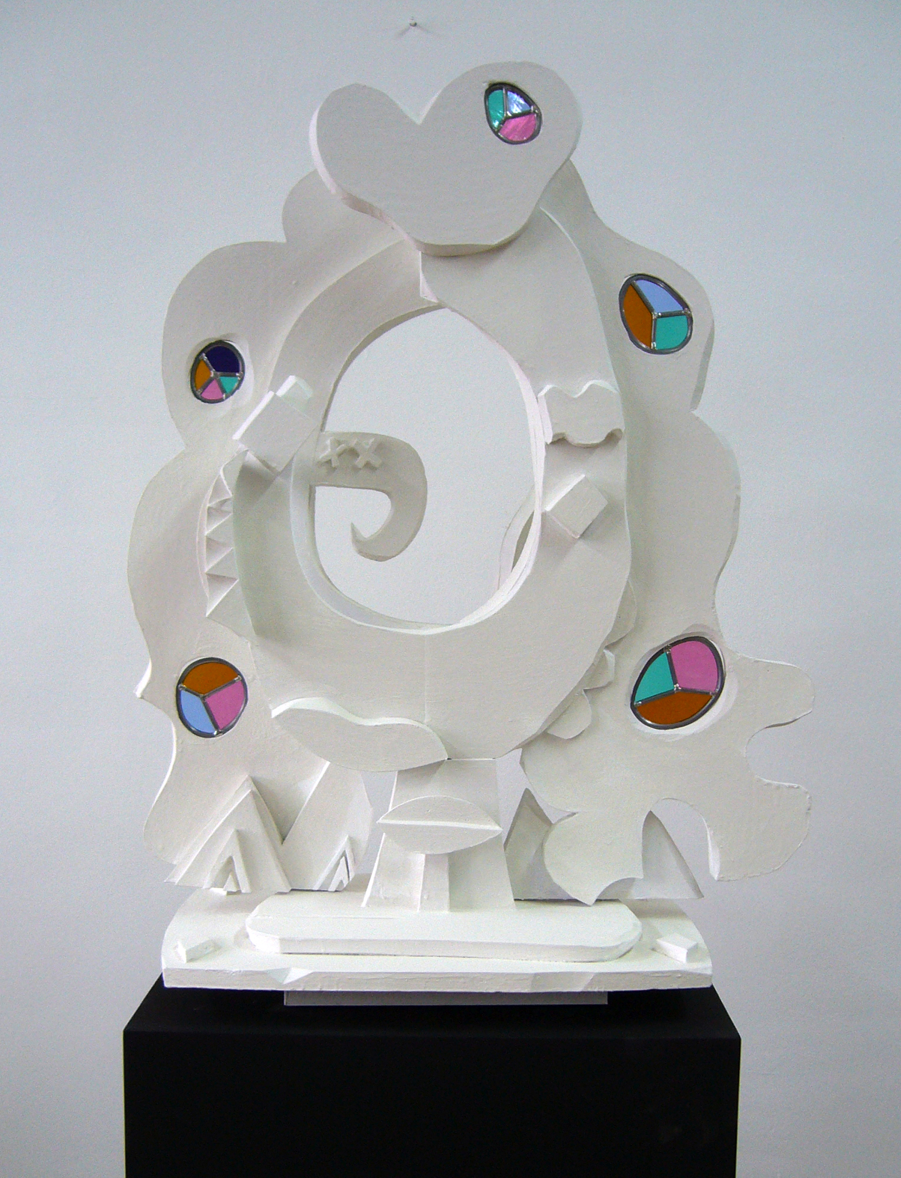 Abbildung der Skulptur "Studentin"